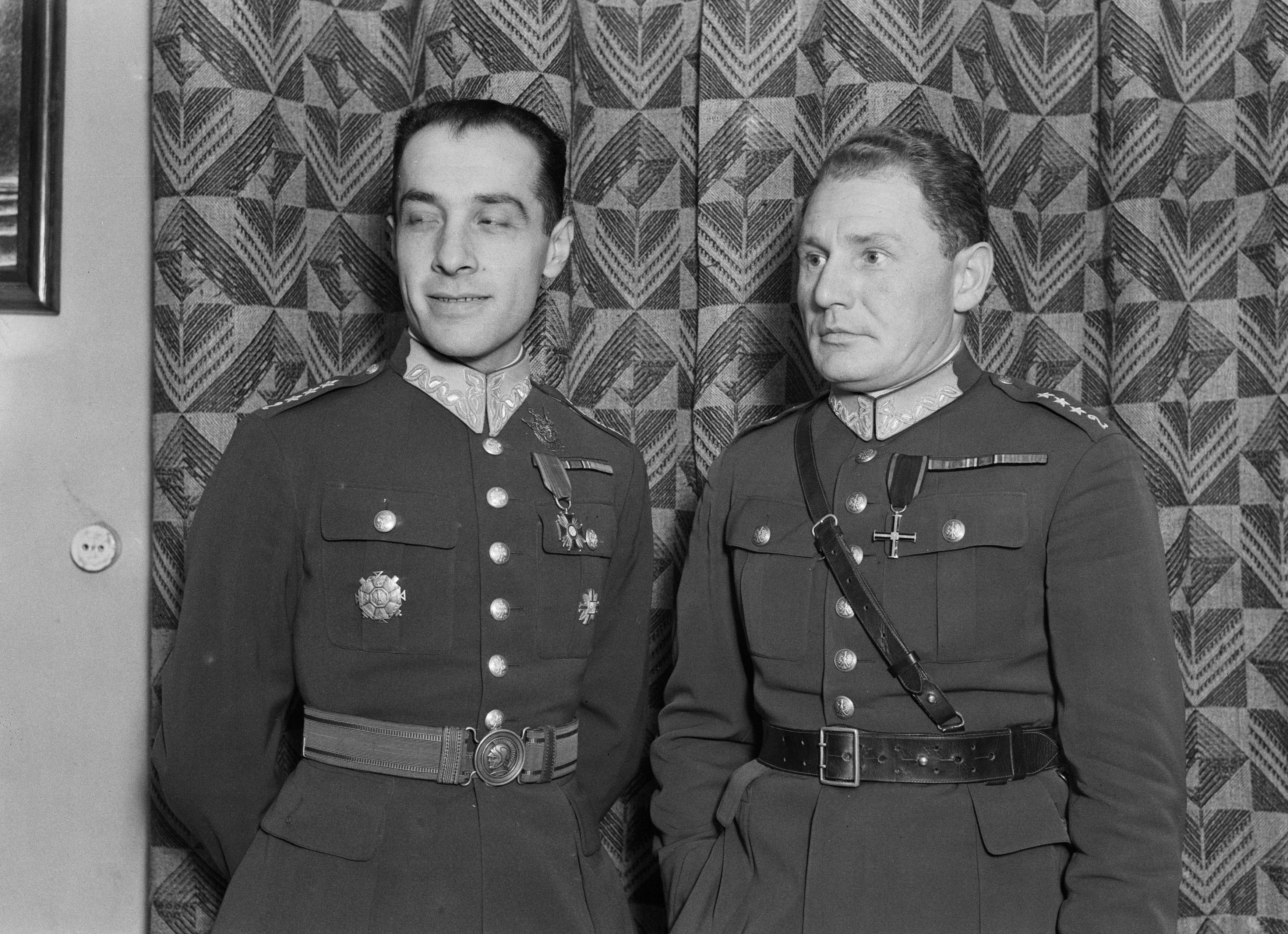 Collectie / Archief : Fotocollectie Van de Poll Reportage / Serie : Reis naar Polen Beschrijving : Warschau. Portret van de luchtmachtkapiteins en ballonvaarders Zbigniew Burzynski (1902-1971) en Franciszek Hynek (1897-1958) Annotatie : Deze beide luchtmachtofficieren hebben zich verdienstelijke gemaakt voor de Poolse luchtvaart. Hun interesse betrof de ballonvaart en het luchtschip (zeppelin). Als ballonvaarders wonnen ze enkele malen de Gordon Bennett Cup. In 1934 brachten ze het Pools vluchtrecord voor luchtballonen op 44 uur Datum : 1934 Locatie : Polen, Warschau Trefwoorden : ballonvaart, luchtmacht, militairen Persoonsnaam : Hynek, Franciszek, Burzynsk, Zibigniew Fotograaf : Poll, Willem van de Auteursrechthebbende : Nationaal Archief Materiaalsoort : Glasnegatief Nummer archiefinventaris : bekijk toegang 2.24.14.02 Bestanddeelnummer : 190-1340